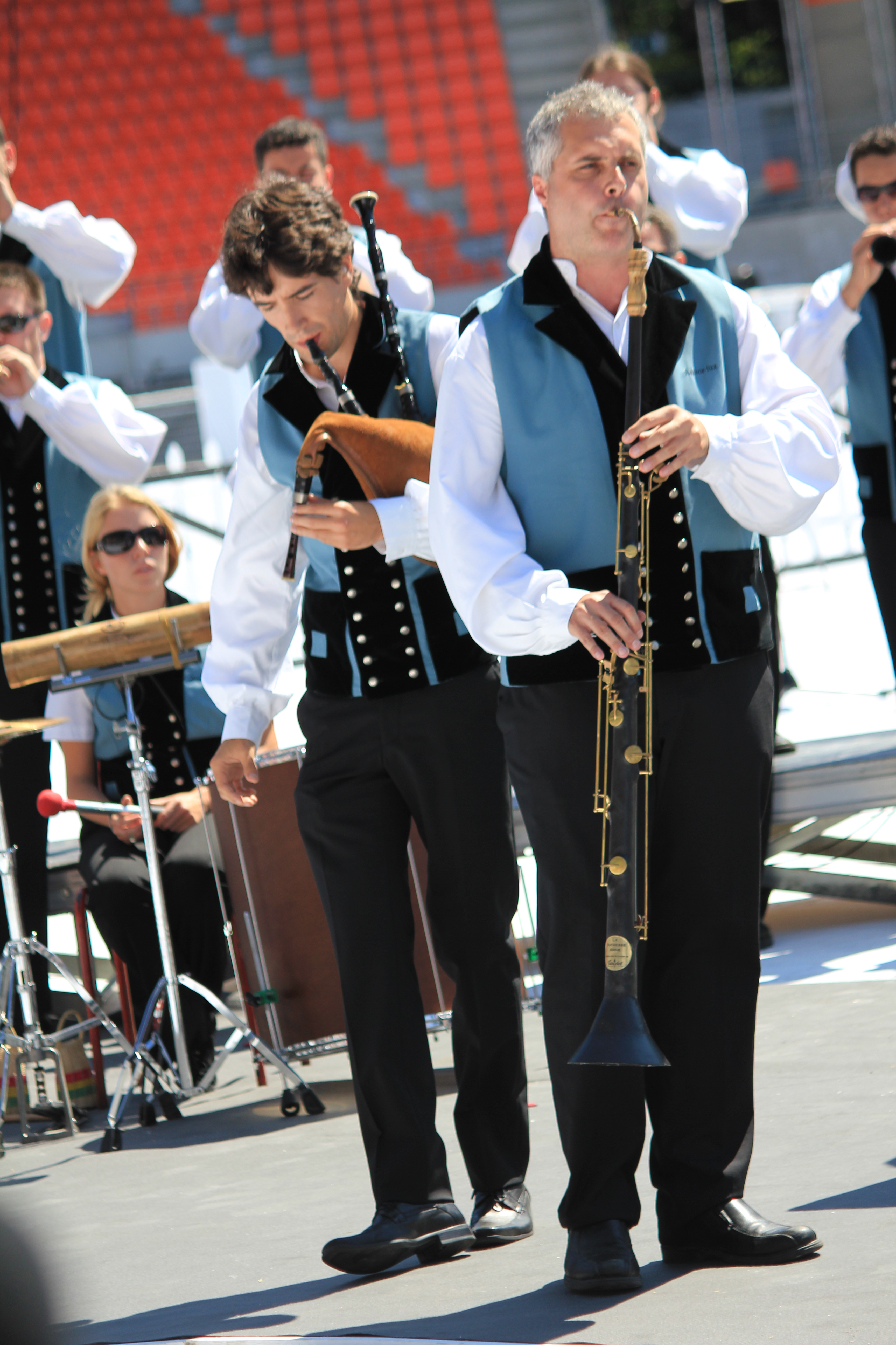 Le Bagad Melinerion lors de l'épreuve d'été du championnat national des bagadoù, organisé dans le cadre du festival interceltique de Lorient 2014.